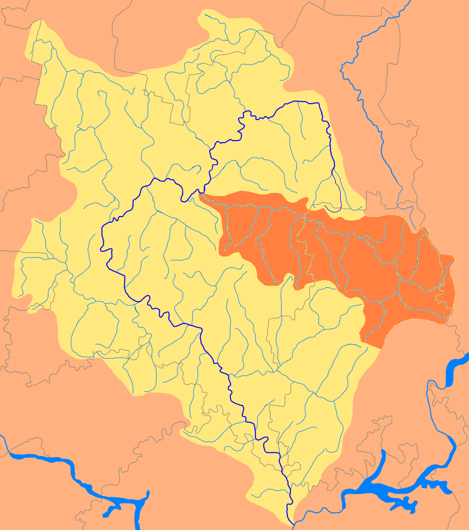 Басейн річки Чепца на фоні басейну річки Вятка